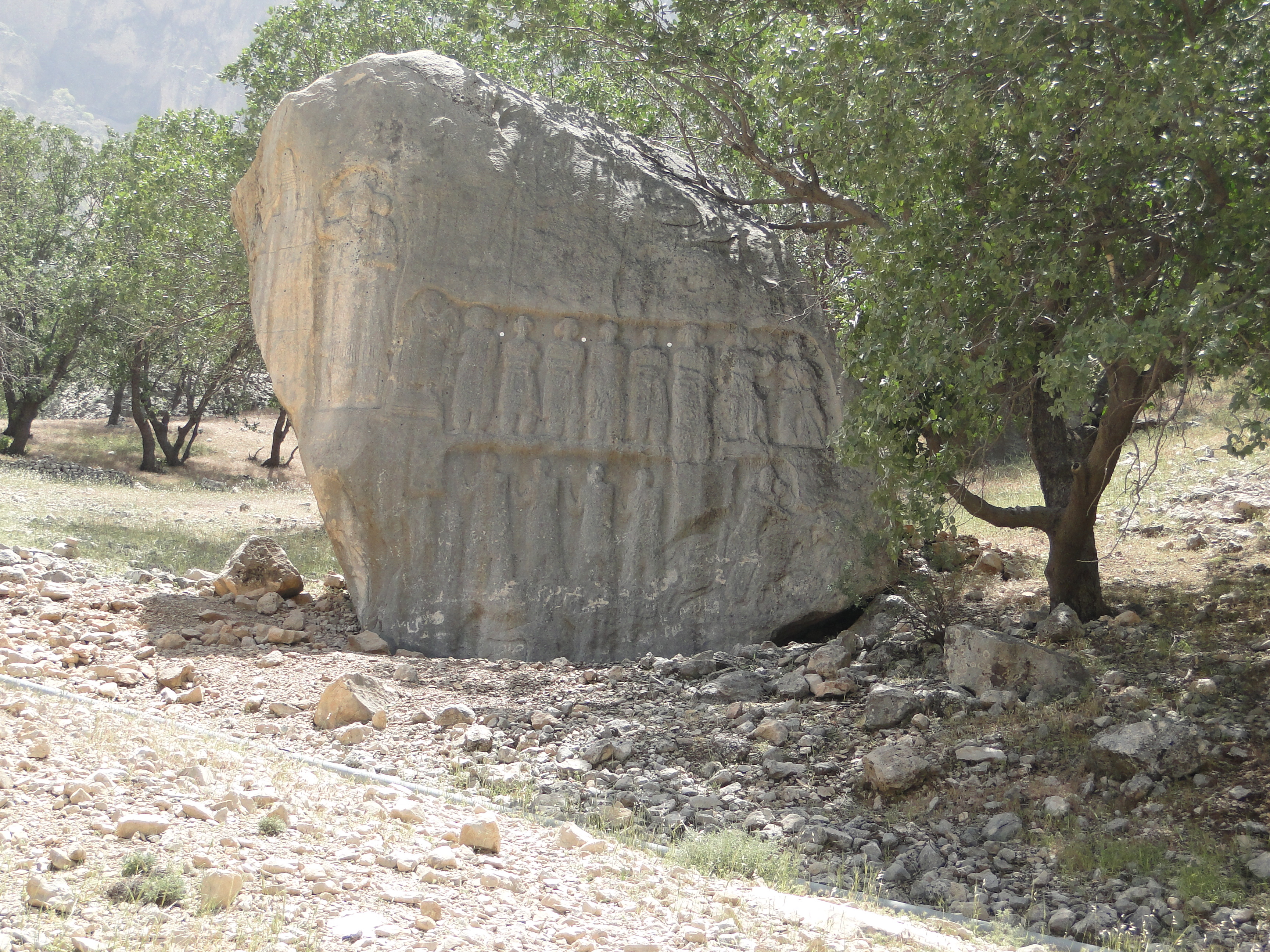 جاذبه های تاریخی شهرستان بهمئی